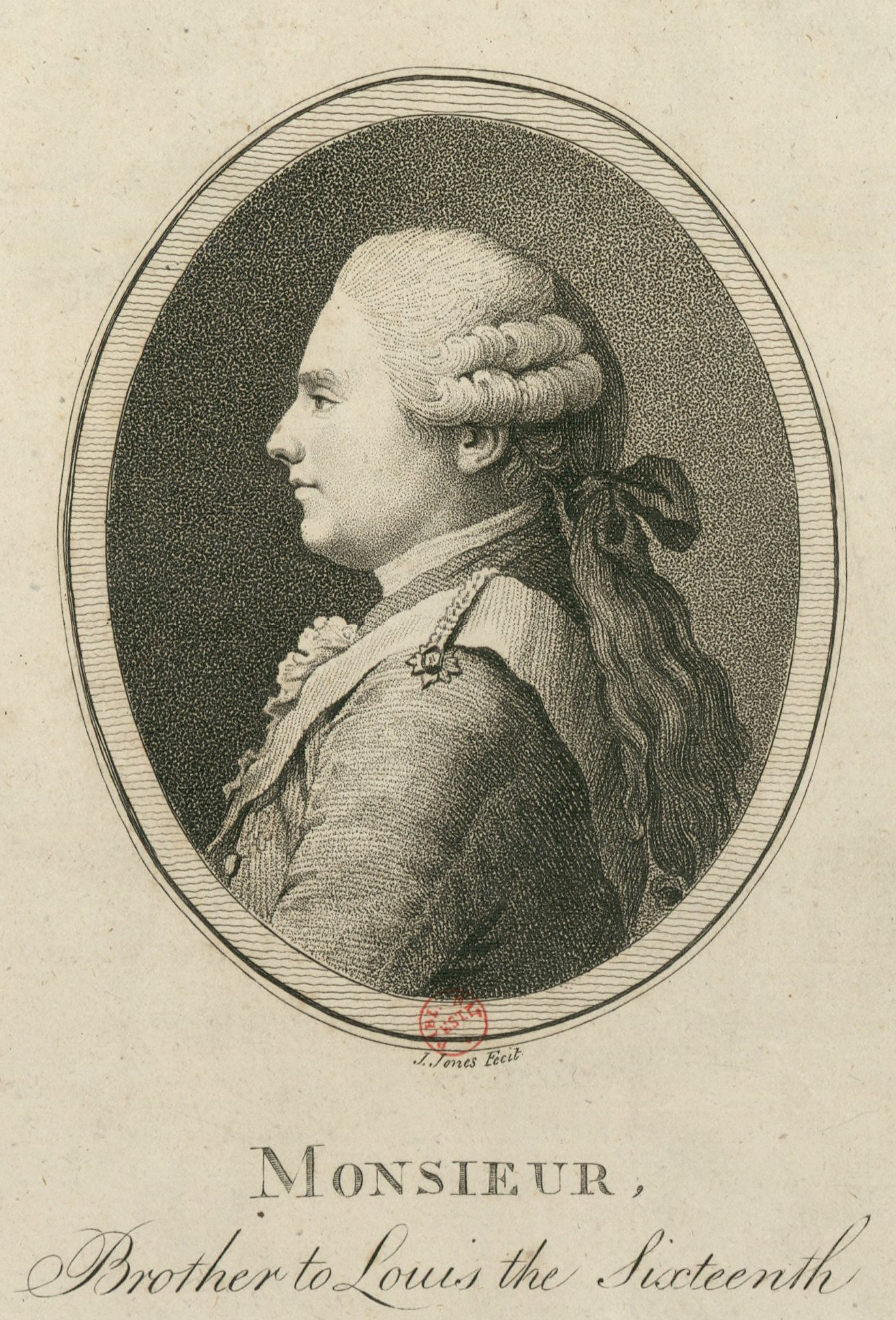 Engraved portrait of Louis XVIII of France